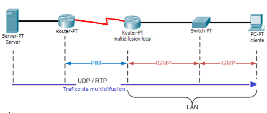 esta imagen muestra como se crea la arquitectura del protcolo IGMP